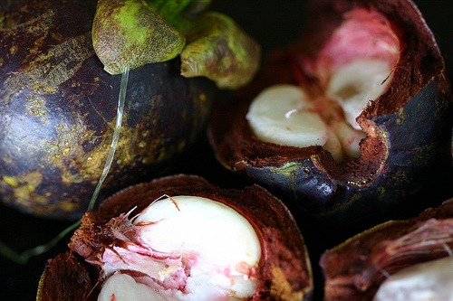 Garcinia mangostana - Frutto di Mangostano (Mangustin - Mangustan - Garcinia)